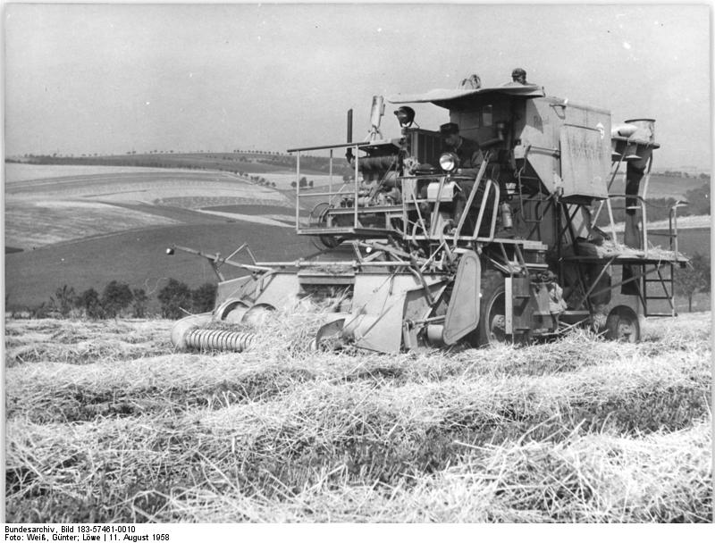 LPG Jahna, Getreideernte ZB-Weiss-Löwe 11.8.1958 Genossenschaftsbauern von Jahna sind Millionäre. Die LPG "Walter Ulbricht" in Jahna, Kreis Meißen, hat 1952 durch 64 Bauern mit 254 ha LNF gegründet, zählt heute 260 Mitglieder. Bis zum Jahrestag der Republik wollen die Genossenschaftsbauern auch die letzten noch einzeln wirtschaftenden vier Bauern für die LPG gewinnen. Bedeutend stiegen die Hektarverträge in der tierischen und pflanzlichen Produktion. Der Wert der Arbeitseinheit, 1954 mit 3, 78 DM errechnet, betrug 1957 bereits 10, 14 DM und für 1960 sind 14, 30 DM je AE geplant. Neben neuen Wirtschaftsgebäuden entstanden viele schöne und kulturelle Einrichtungen. UBz: Der Stützpunkt Jahna der MTS Schletta ist dem LPG-Vorsitzenden unterstellt. Ein Mähdrescher beim Schwaddrusch.